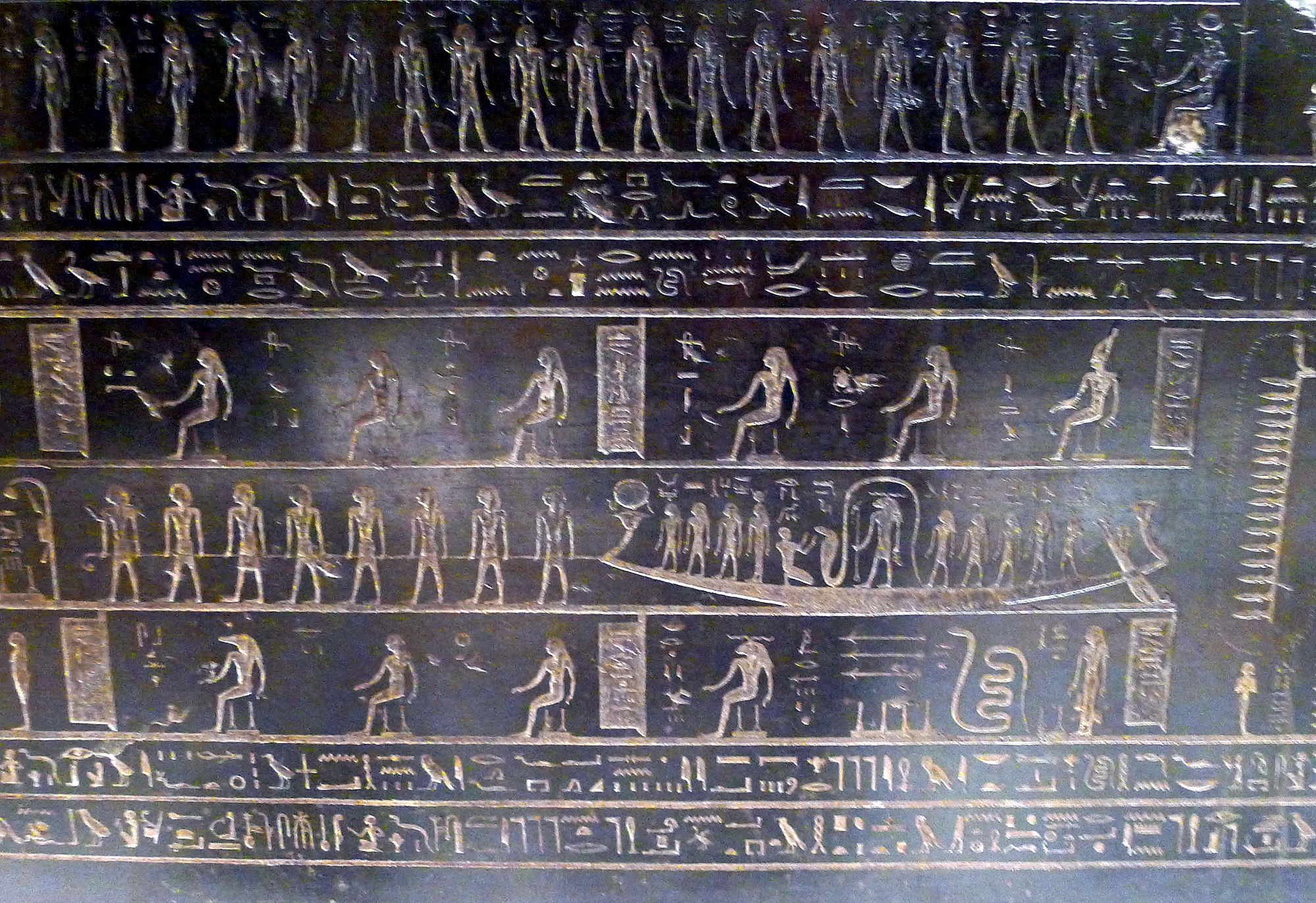 Sarcophage de Djedhor (cuve détail)